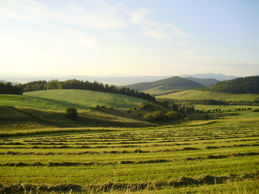 ponad Lom